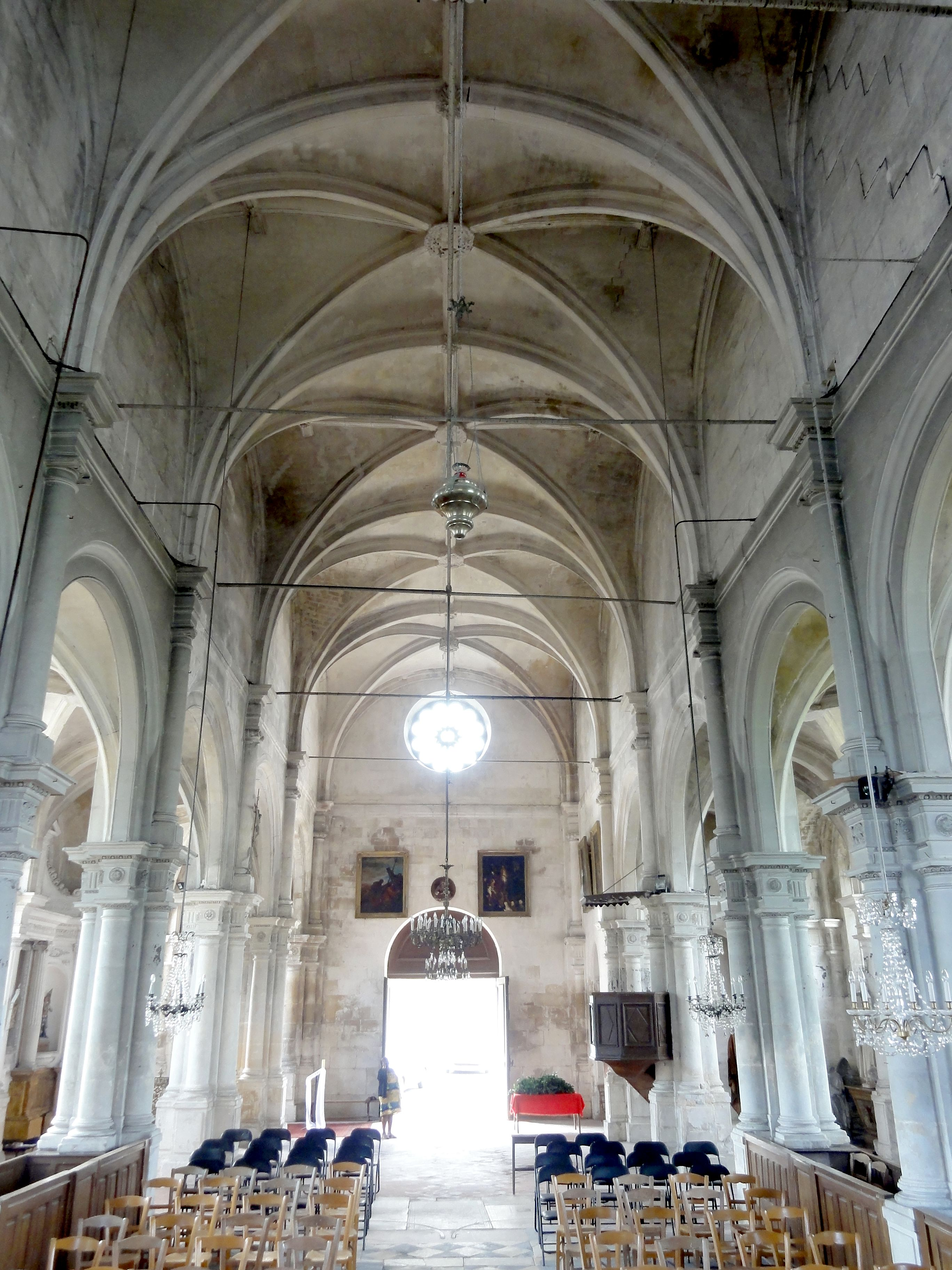 Nef, vue vers l'ouest.